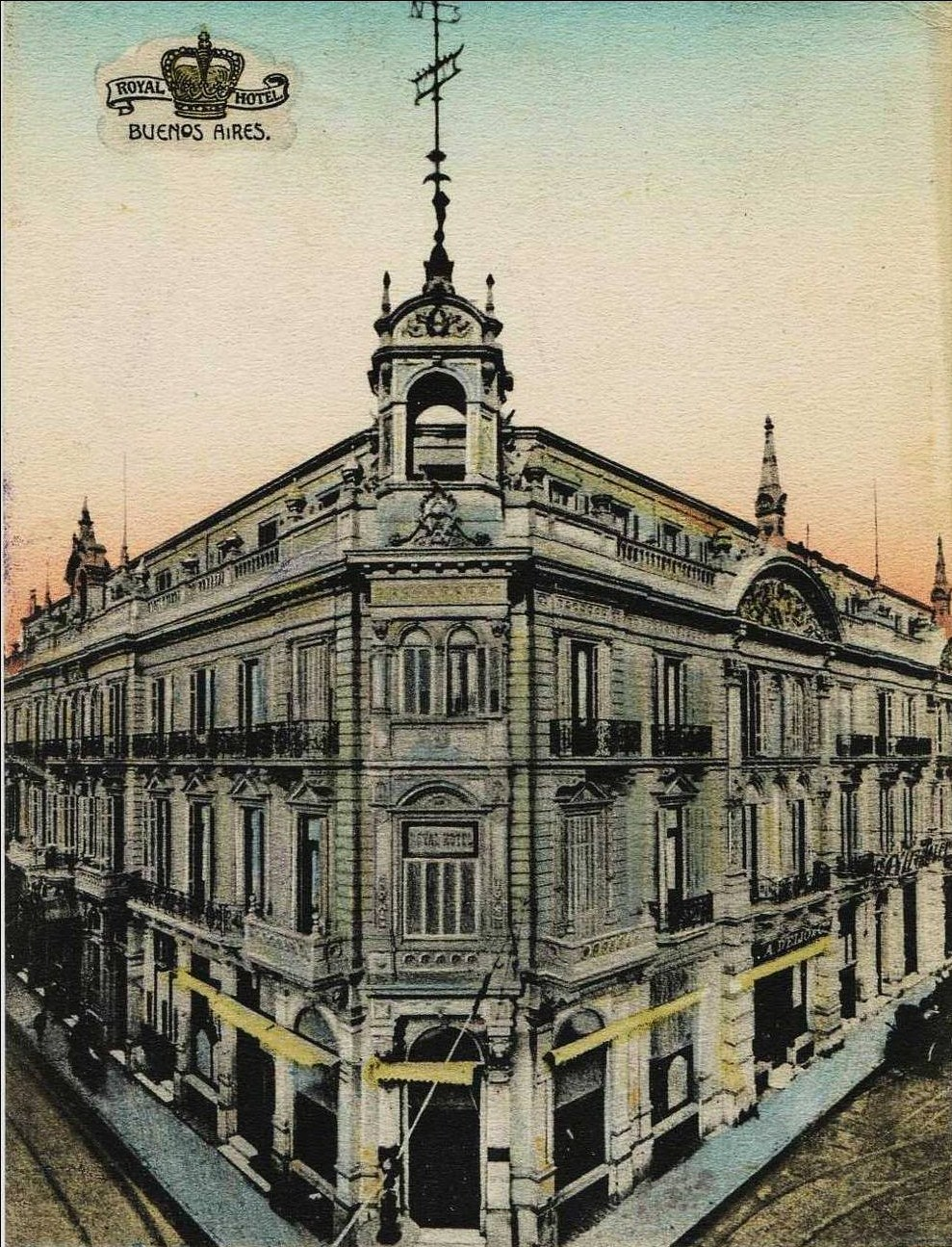 Vista del Royal Hotel en la esquina de las calles Corrientes y Esmeralda en Buenos Aires. También sede del Teatro Odeón, fue demolido en 1991.